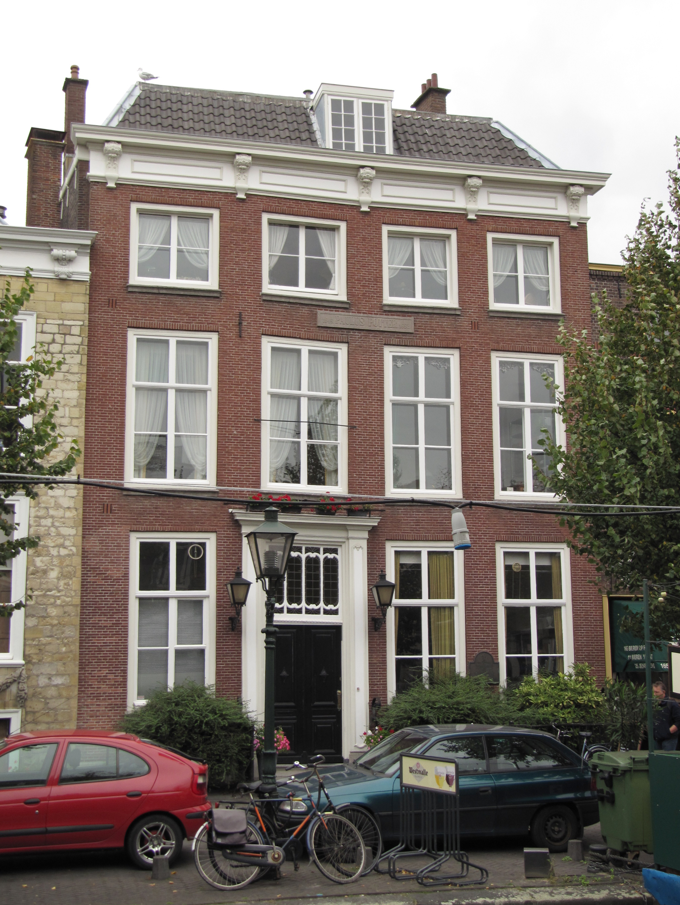 RM17506 Den Haag - Dunne Bierkade 17.jpgJan van Goyenhuis: In de zeventiende eeuw het woonhuis van schilder Jan van Goyen. Ook schilder Jan Steen, die introk bij Van Goyen, heeft hier vijf jaar gewoond en gewerkt. Steen trouwde met Margriet van Goyen, een dochter van de schilder. Het pand werd gebouwd in opdracht van stadsbouwmeester Claes Dircx van Balckeneynde, die zelf op nummer 18 woonde.